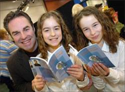 Stephan et ses filles en 2005